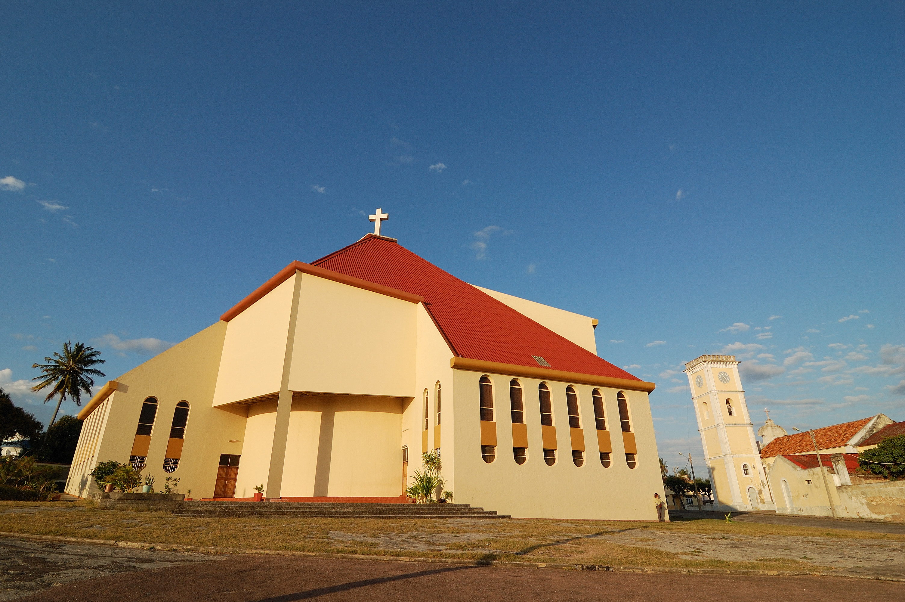 Inhambane, Moçambique [2009]